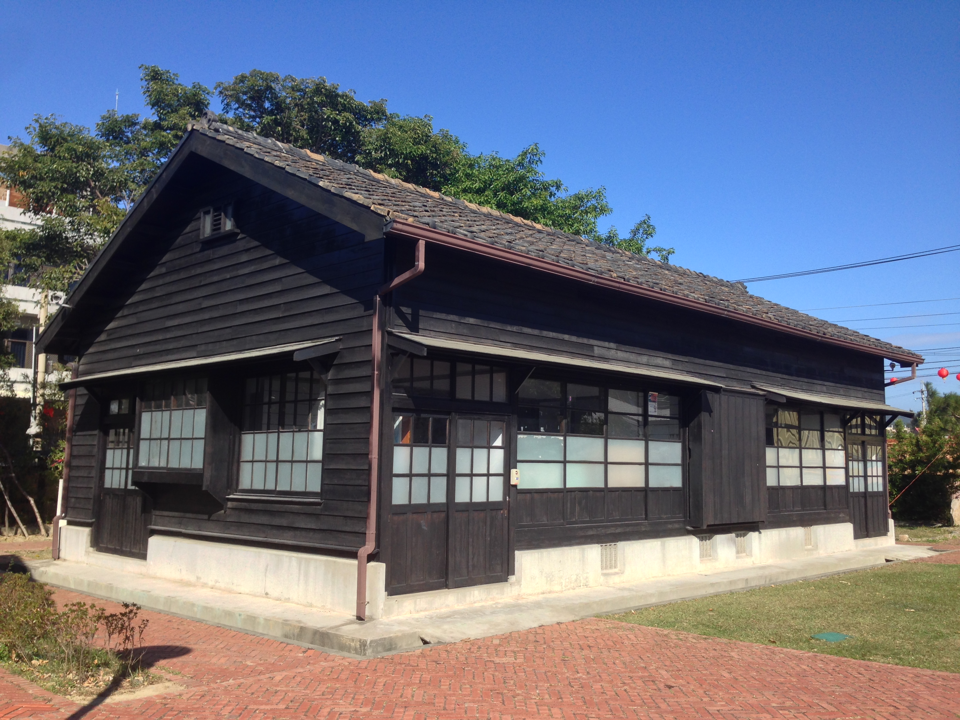 苑裡鎮山腳國小日治後期宿舍之一